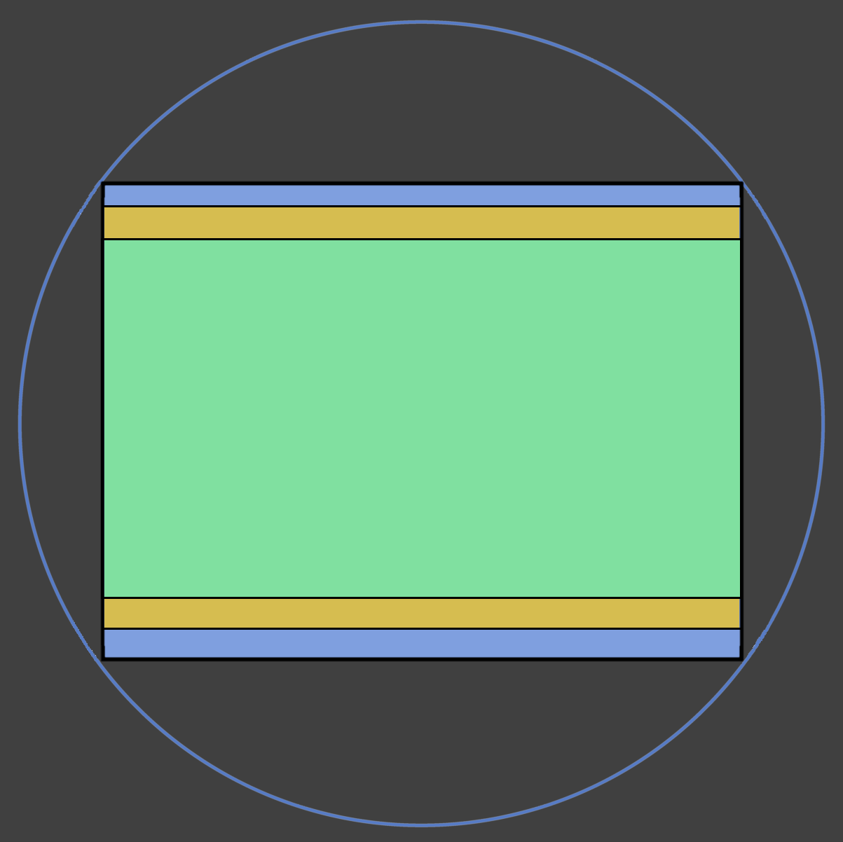 Konventionelle Sensorformatumschaltung durch einfachen Beschnitt. Seitenverhältnisse 4:3 blau, 3:2 orange, 16:9 grün.